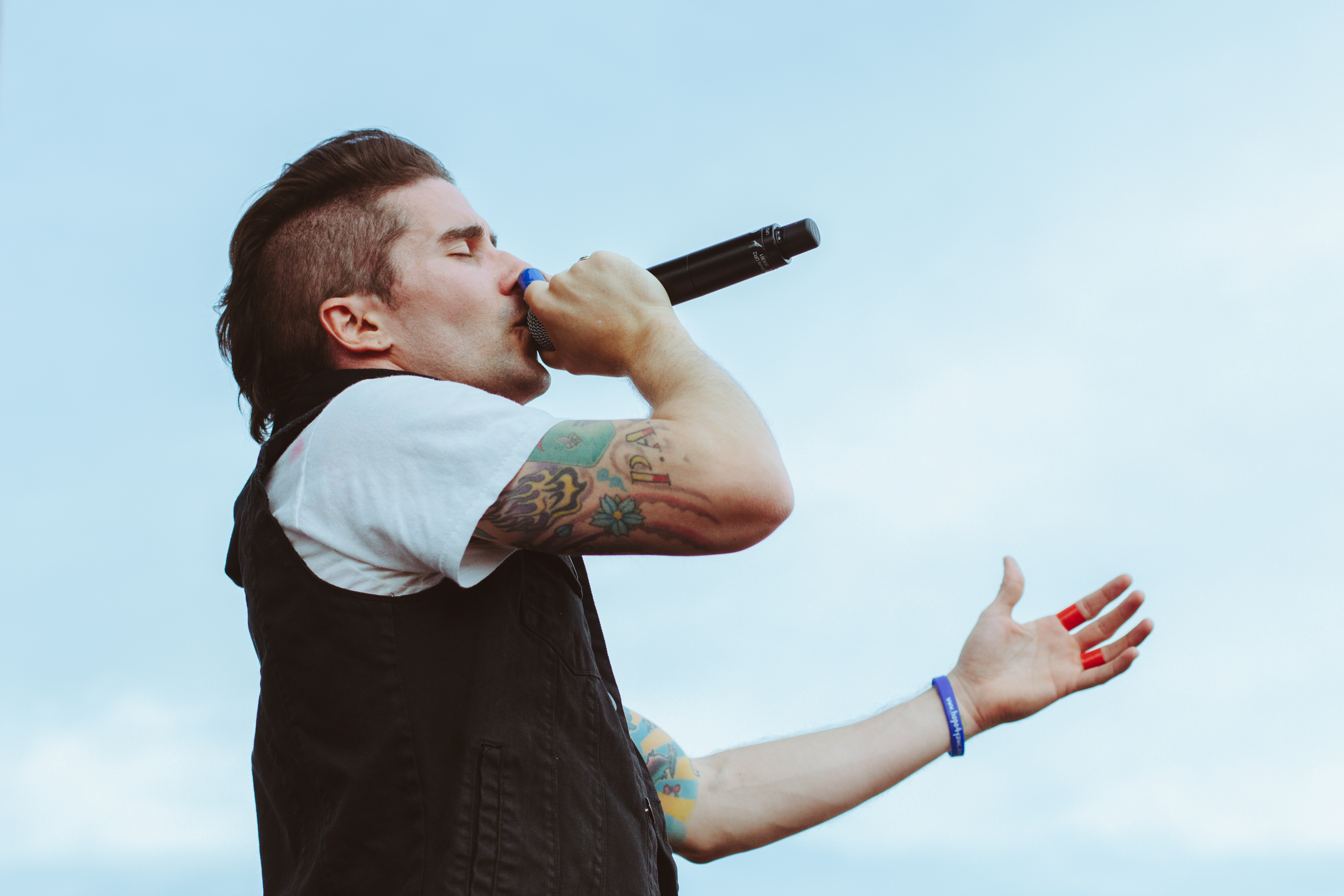 Greek_Fire-2978